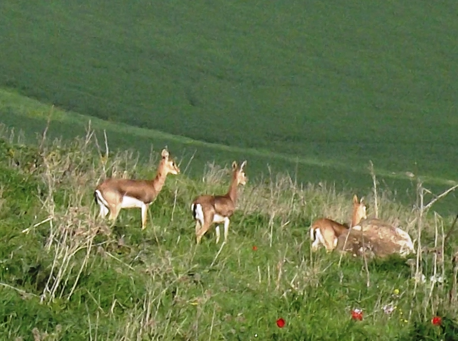 עדר צבאים בנחל תבור, Original Image Name:עדר צבאים, Location:נחל תבור